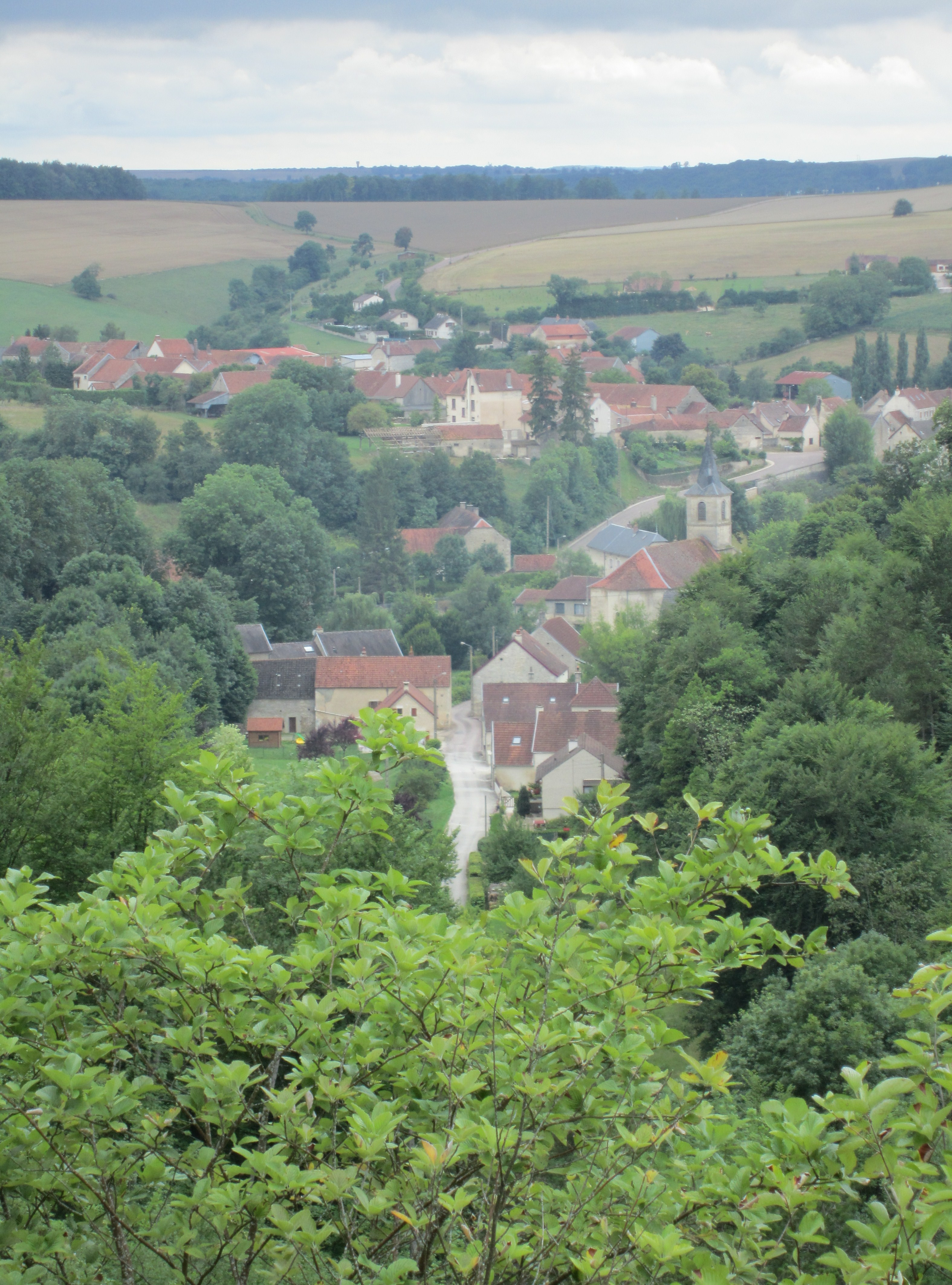 Village d'Etalante (Côte-d'Or) depuis le cirque de la Coquille